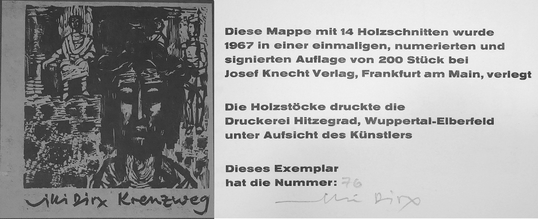 Kreuzwegmappe, 14 Holzschnitte, Blattgröße 40,0 x 41,0 cm Bildgröße 34,7 x 35,0 cm, Auflage 1967 : 200 Stück, einmalig, nummeriert, signiert, Verlag Josef Knecht, Frankfurt